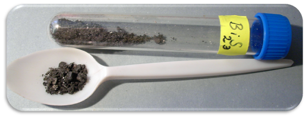 Sulfid bismutitý - Bi2S3